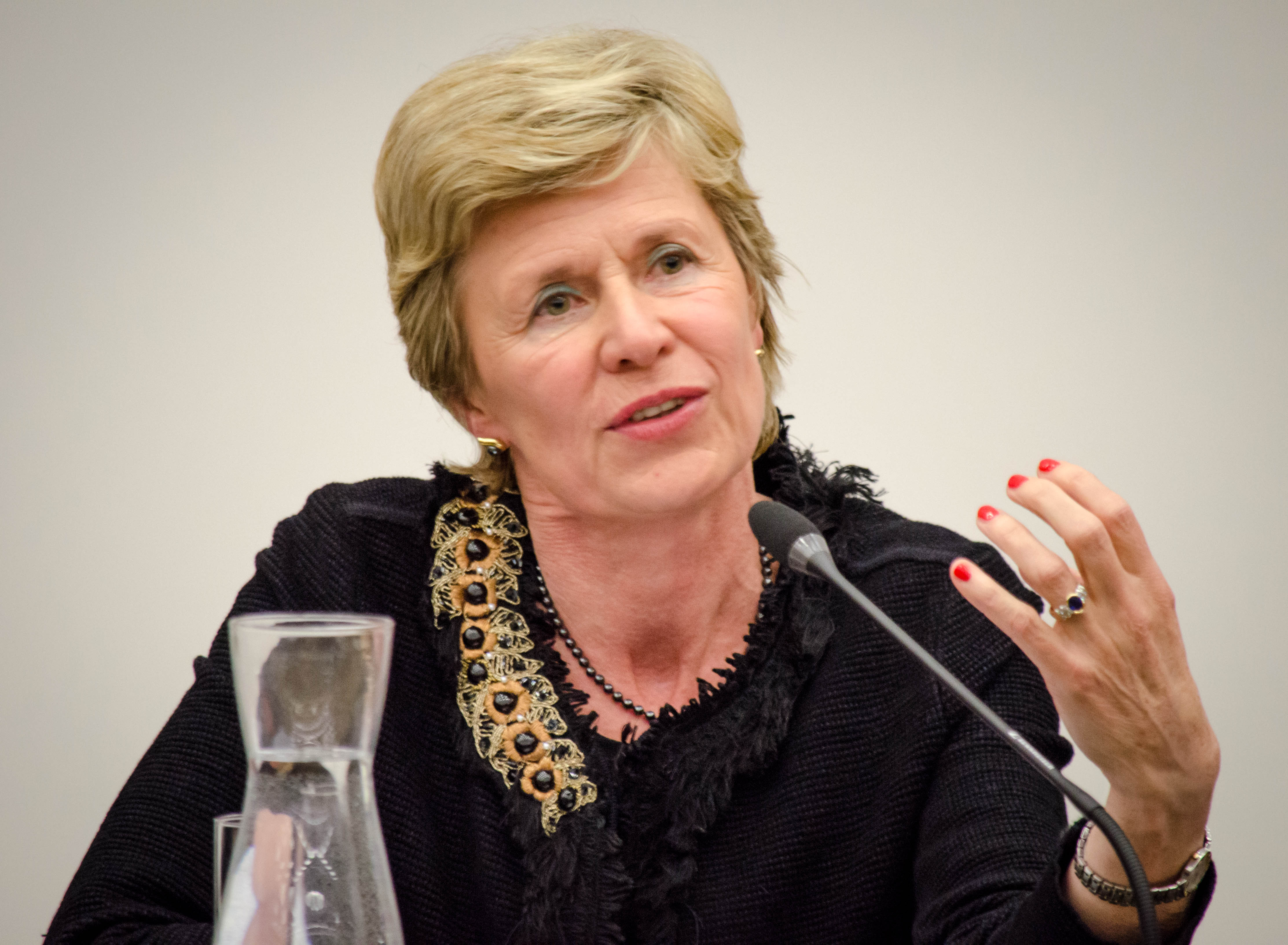 Anne De Paepe op het Kandidaat Rectorendebat 2013